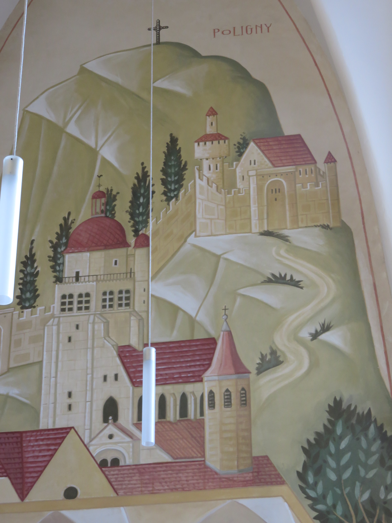 Château de Poligny (Jura), détail de fresque de l'église du monastère des Clarisses de Poligny